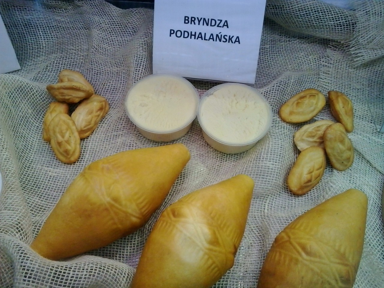 Sery z Podhala.